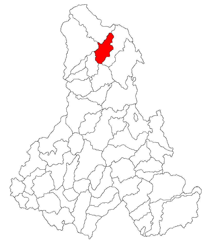 Categorie:Hărţi ale judeţului Harghita